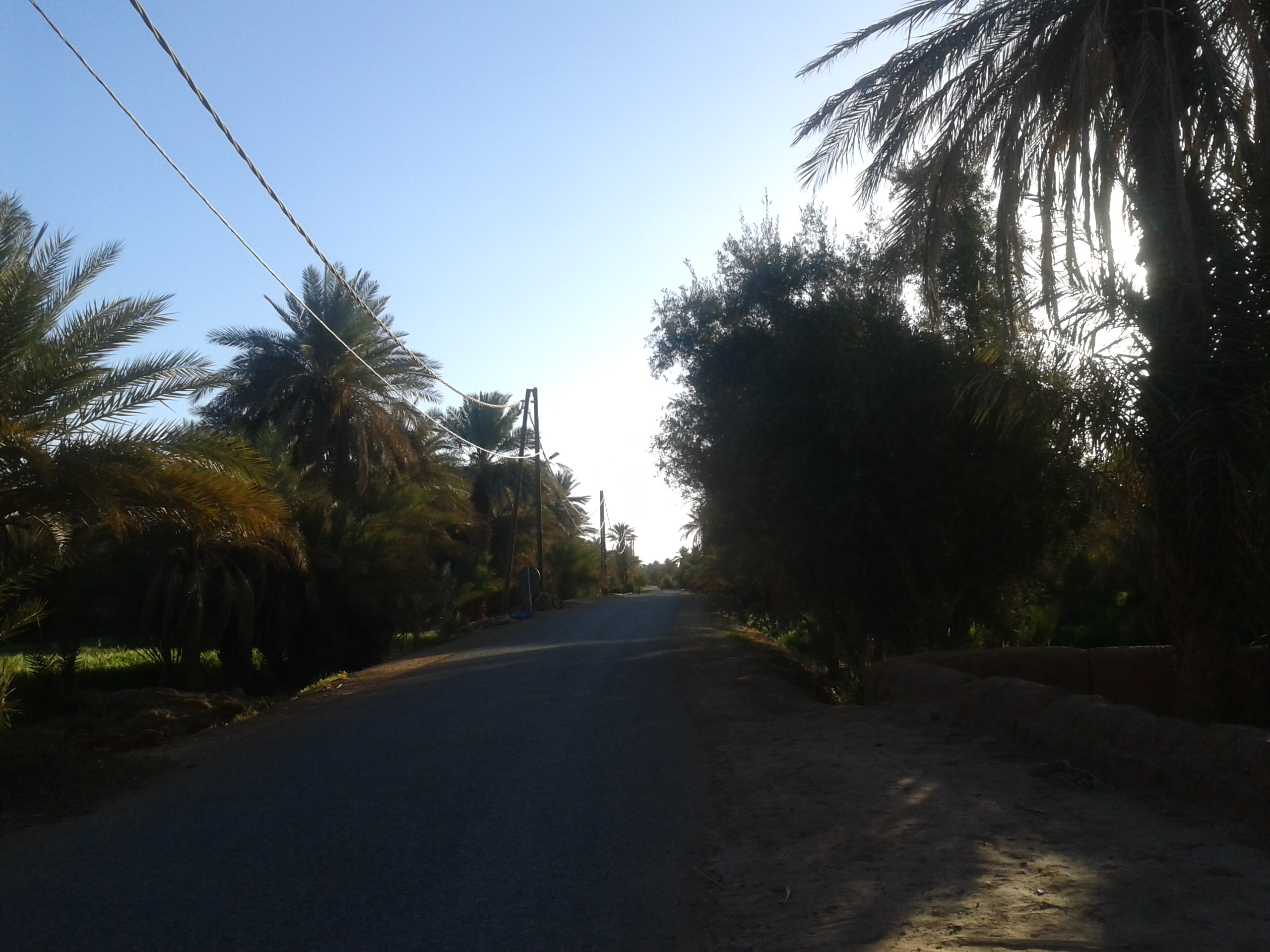 قصر تيغفرت من منطقتي